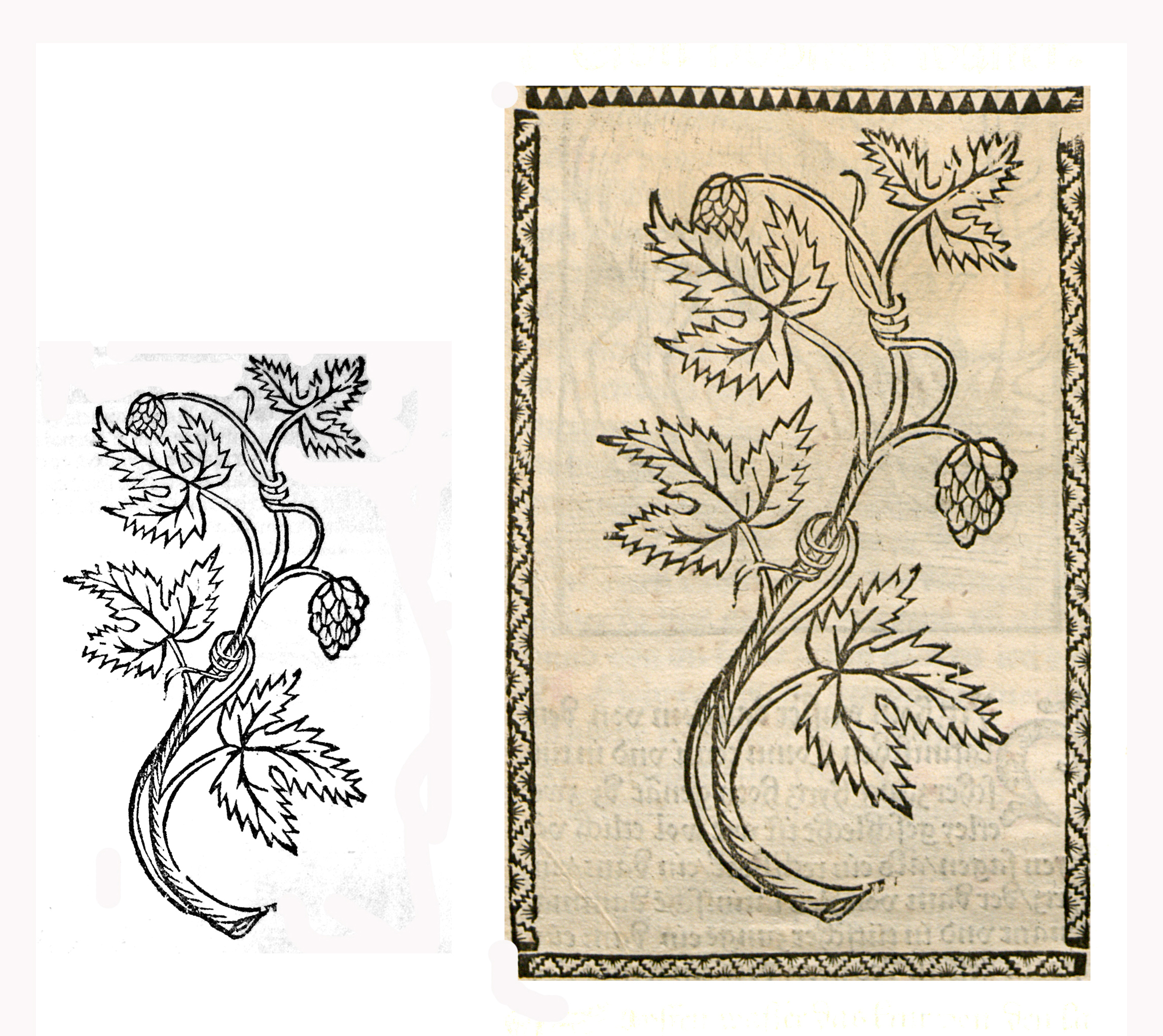 Abbildung von Hopfen (Humulus lupulus)